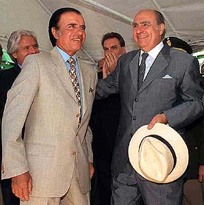 PRESIDENTE DE LA REPUBLICA ORIENTAL DEL URUGUAY, JULIO MARIA SANGUINETTI recibió al PRESIDENTE DE LA REPUBLICA ARGENTINA, DR. CARLOS SAUL MENEM